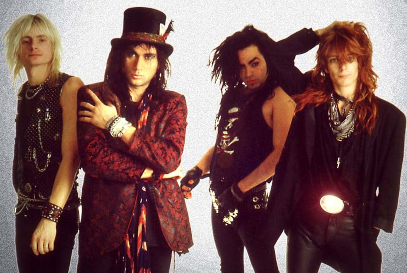 Hervé Rozoum mit der Gruppe The Gunslingers